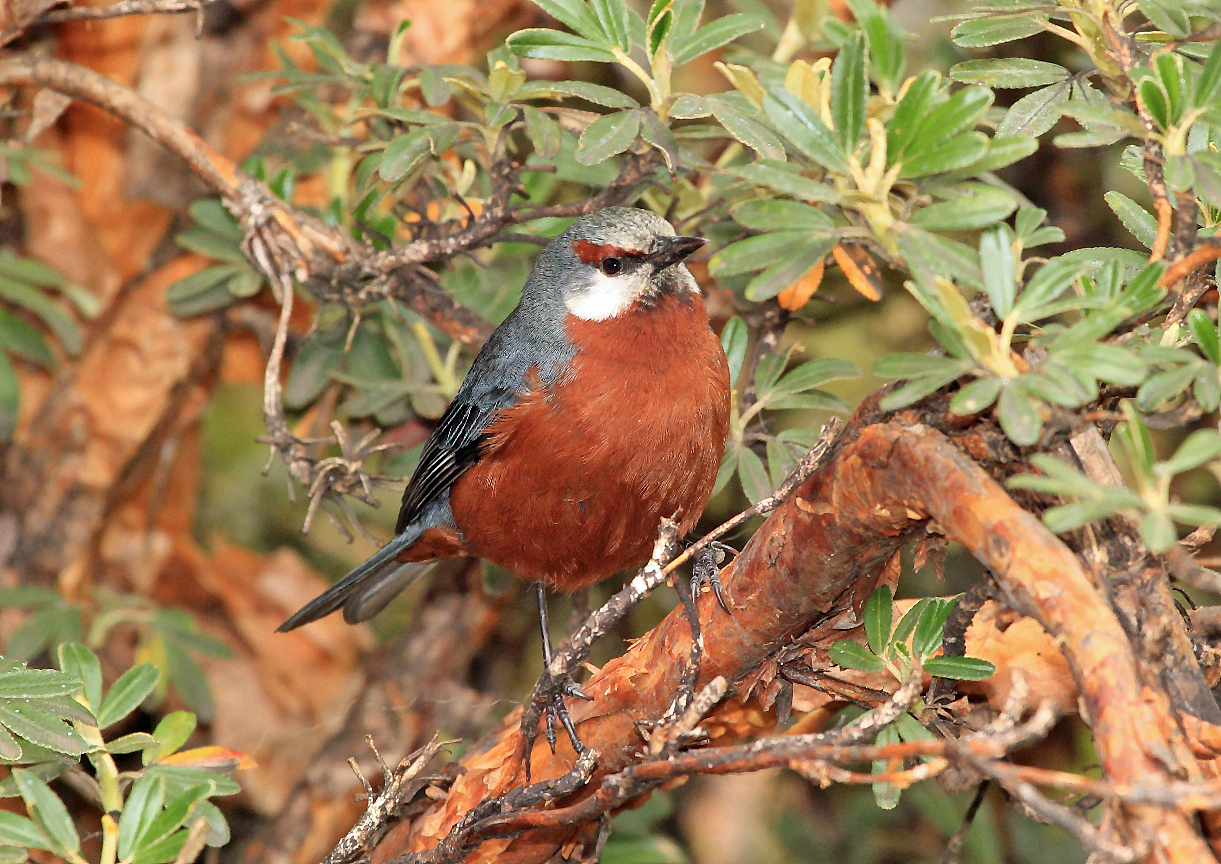 Giant Conebill, Cajas, Ecuador